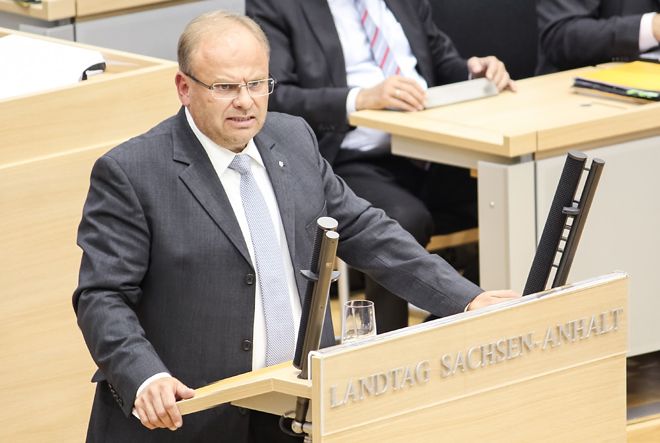 Arnd Czapek